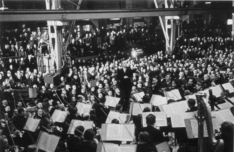 ADN-ZB Furtwängler, Dr. Wilhelm Dirigent geb. 25.1.1886 gest. 20.11.1954 Baden-Baden UBz.: Das Berliner Philharmonische Orchester unter Leitung seines Dirigenten, Dr. W. Furtwängler, bei einem Werkpausenkonzert in einer Halle der AEG Werke in Berlin, das von der sogenannten KdF ("Kraft durch Freude") im faschistischen Deutschland organisiert wurde. 26.2.1942 L 0607/504N